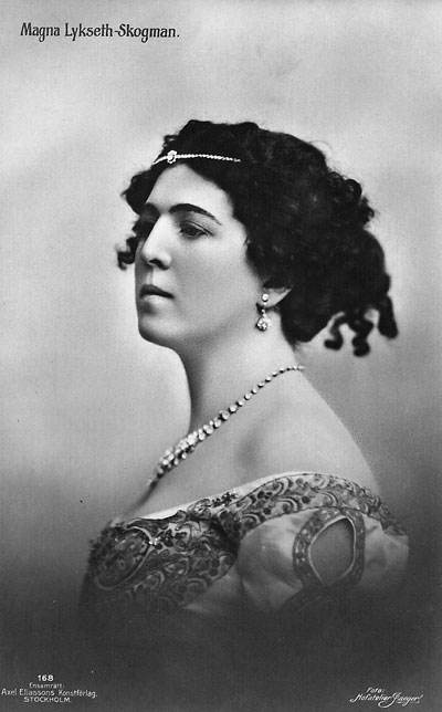 Magna Lyckseth-Skogman